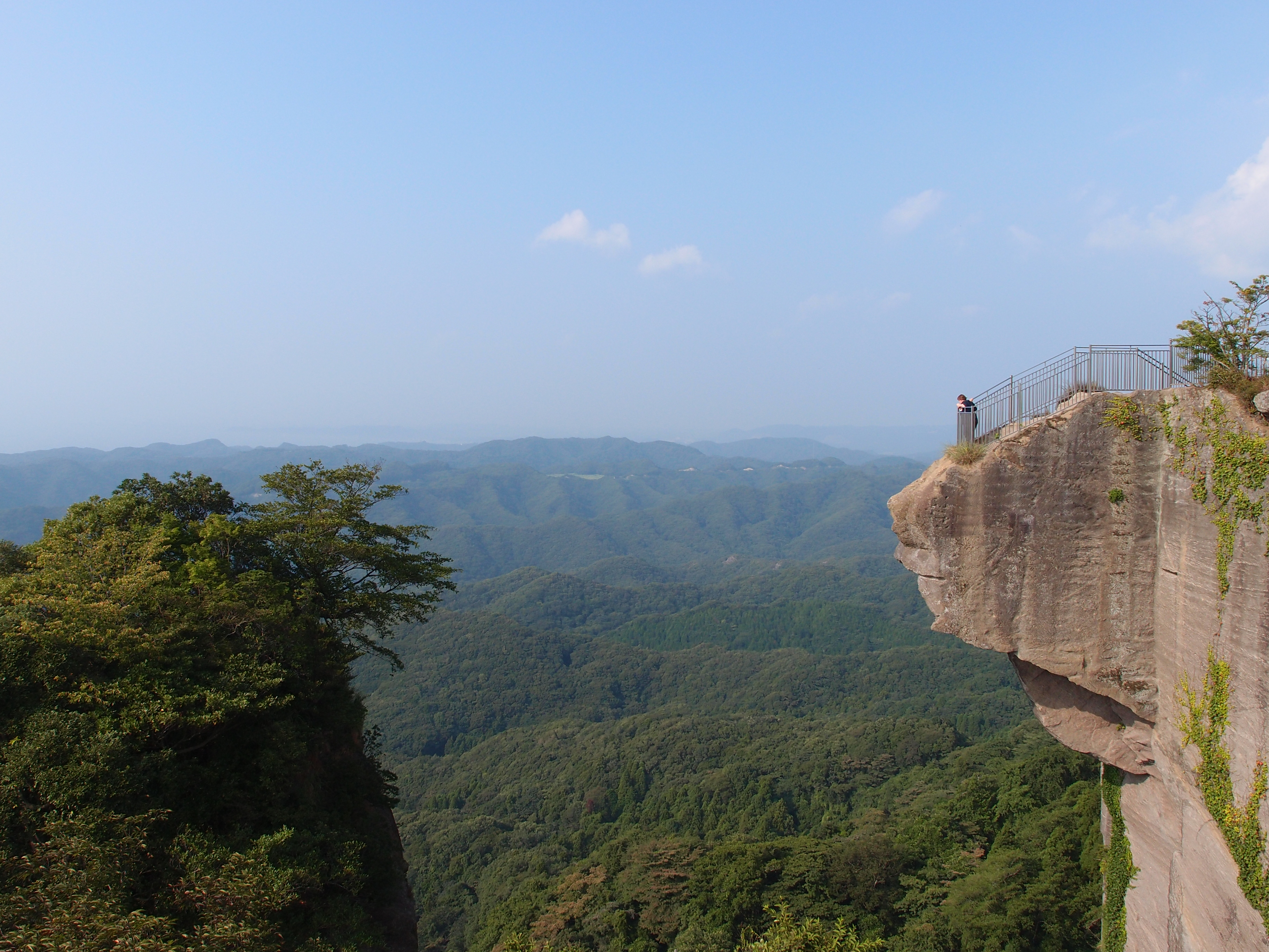 Jigou-nozoki in Mount Nokogori.